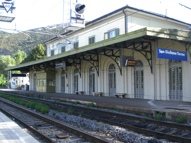 FS